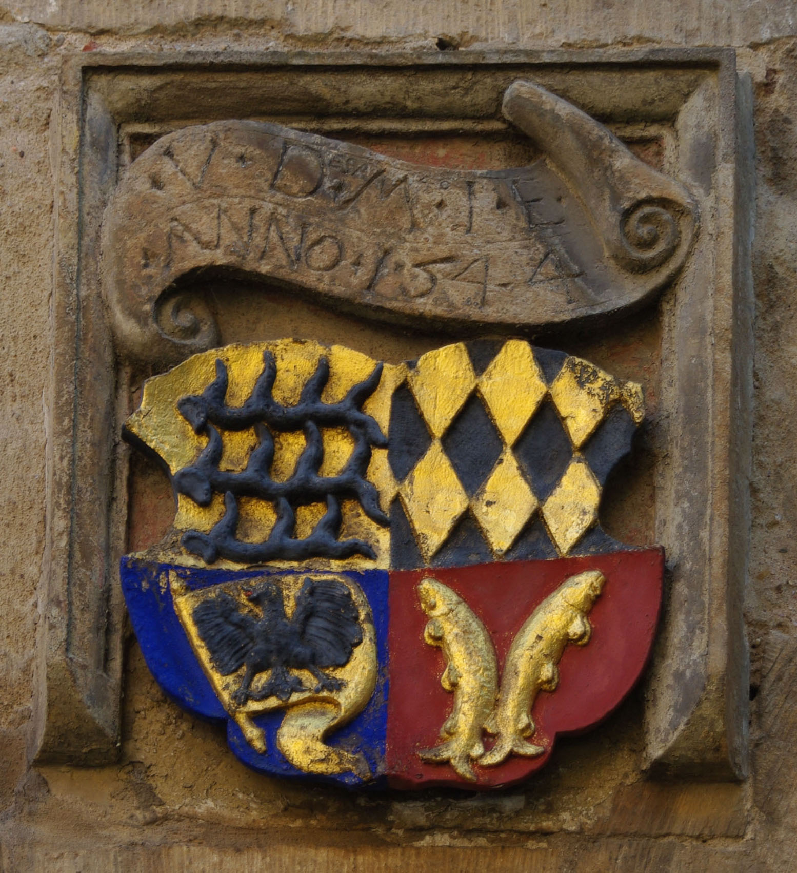 Das württembergische Herzogwappen mit den drei Hirschstangen, der Markgröninger Reichssturmfahne, den Fischen von Mömpelgard und den Wecken von Teck. Darüber die Anfangsbuchstaben des Wahlspruchs Herzog Ulrichs: V.D.M.I.E. (Verbum dei manet in eternum = Gottes Wort bleibt in Ewigkeit). Unter den Buchstaben die Jahreszahl 1544. Standort: über der alten Eingangstür zum ersten evangelischen Pfarrhaus in Württemberg (erbaut von Herzog Ulrich, 1544), gegenüber der Bartholomäuskirche Markgröningen.